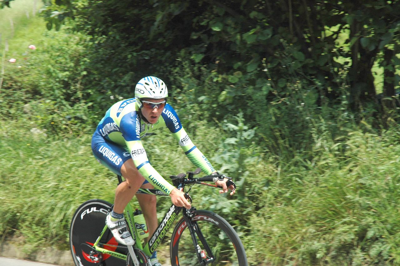 Guido Trenti, Euskal Bizikleta